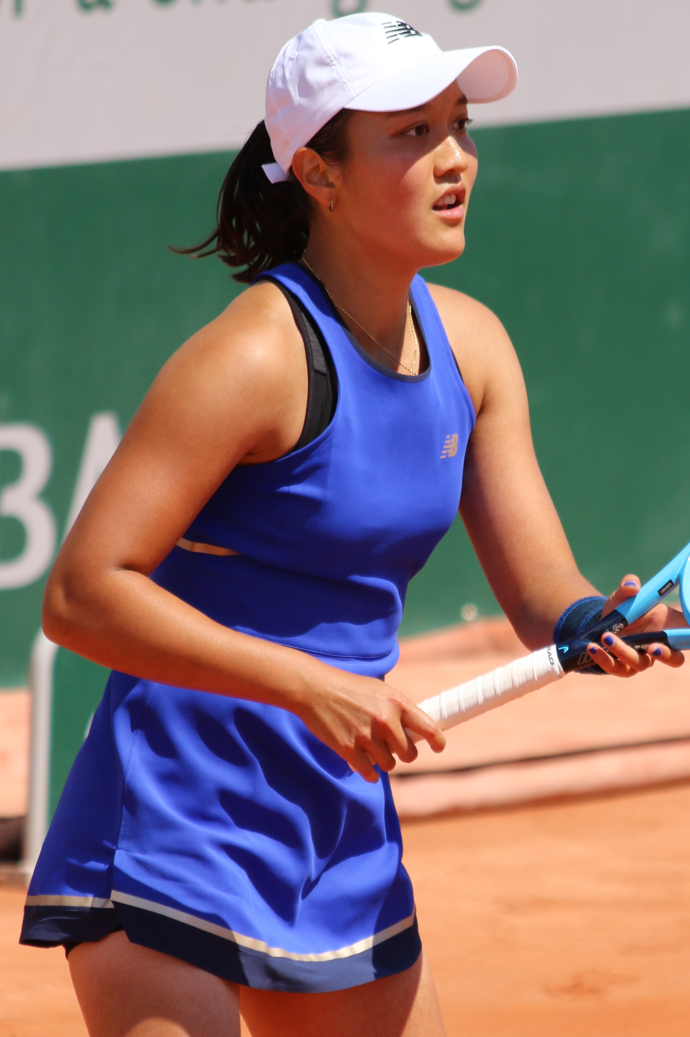 Tan RG19 (11)